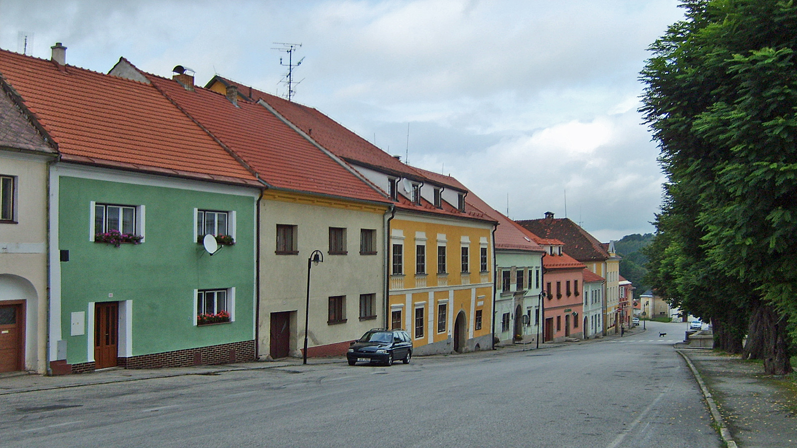 Square in Benešov n.Č.